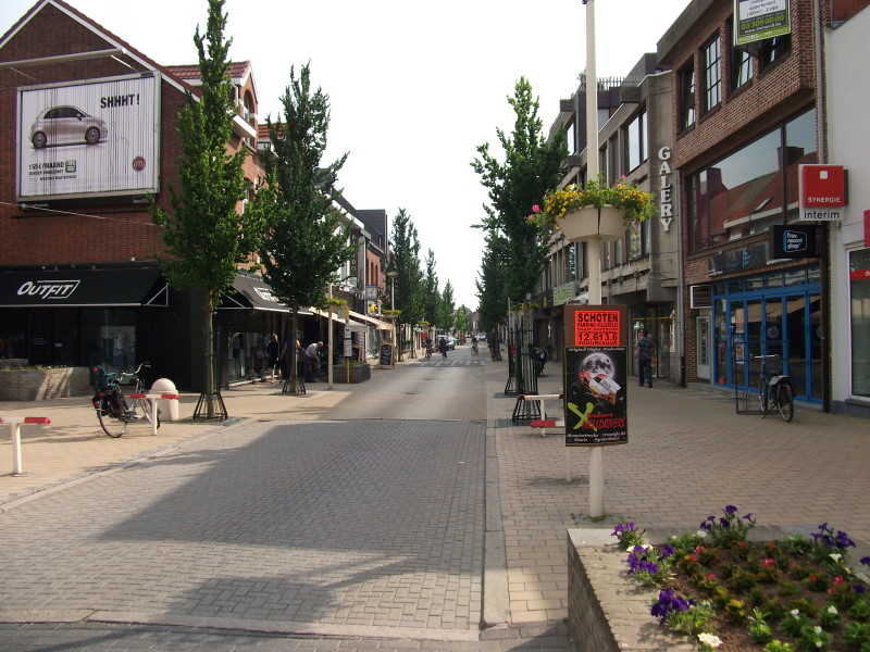 Paalstraat (hoofd- en winkelstraat) in Schoten (België)